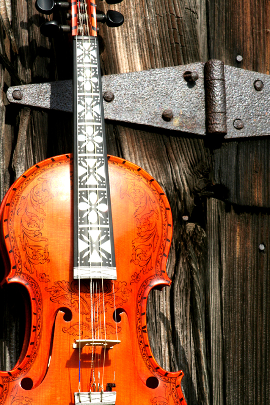 A Norwegian hardanger fiddle.